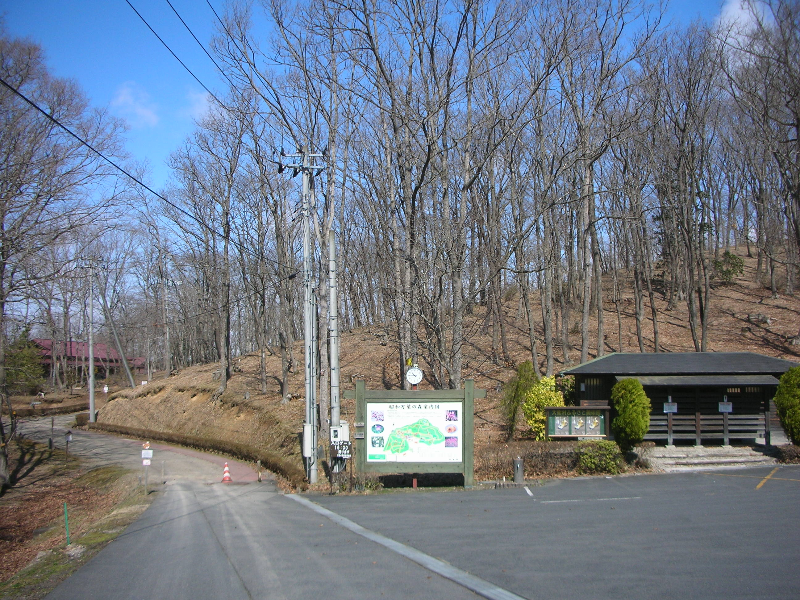 昭和万葉の森